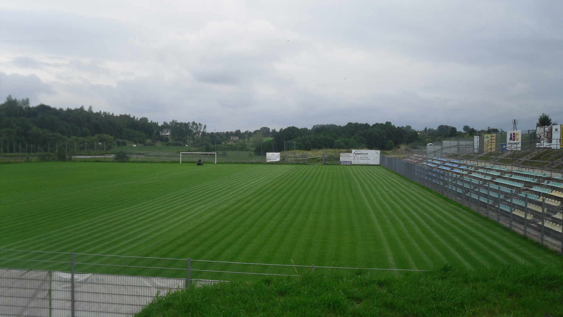 Stadion Kaszubii